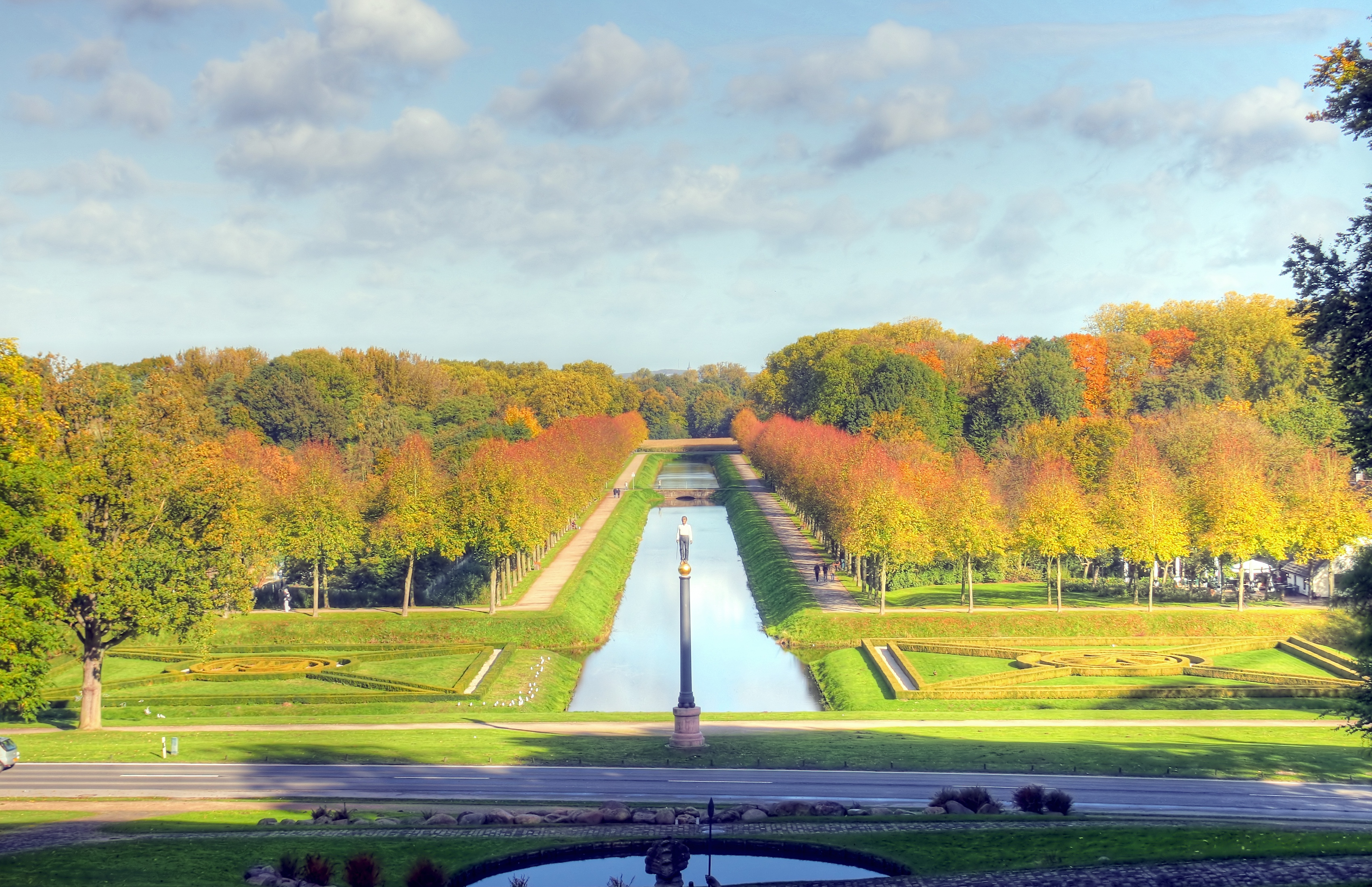 Neuer Tiergarten Kleve. Parkanlage im Herbst mit Prinz-Moritz-Kanal. Vor dem Kanal steht der Eiserne Mann